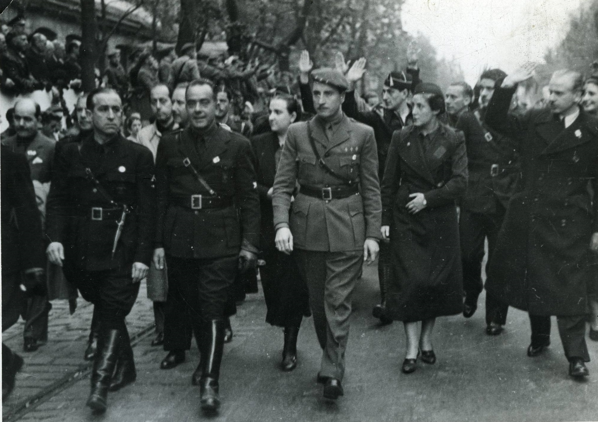 Fotografía que muestra la entrada de los vencedores en San Sebastián en 1939. Se distingue en primera fila a Ramón Serrano Suñer y Pilar Primo de Rivera, primero y segunda por la derecha.